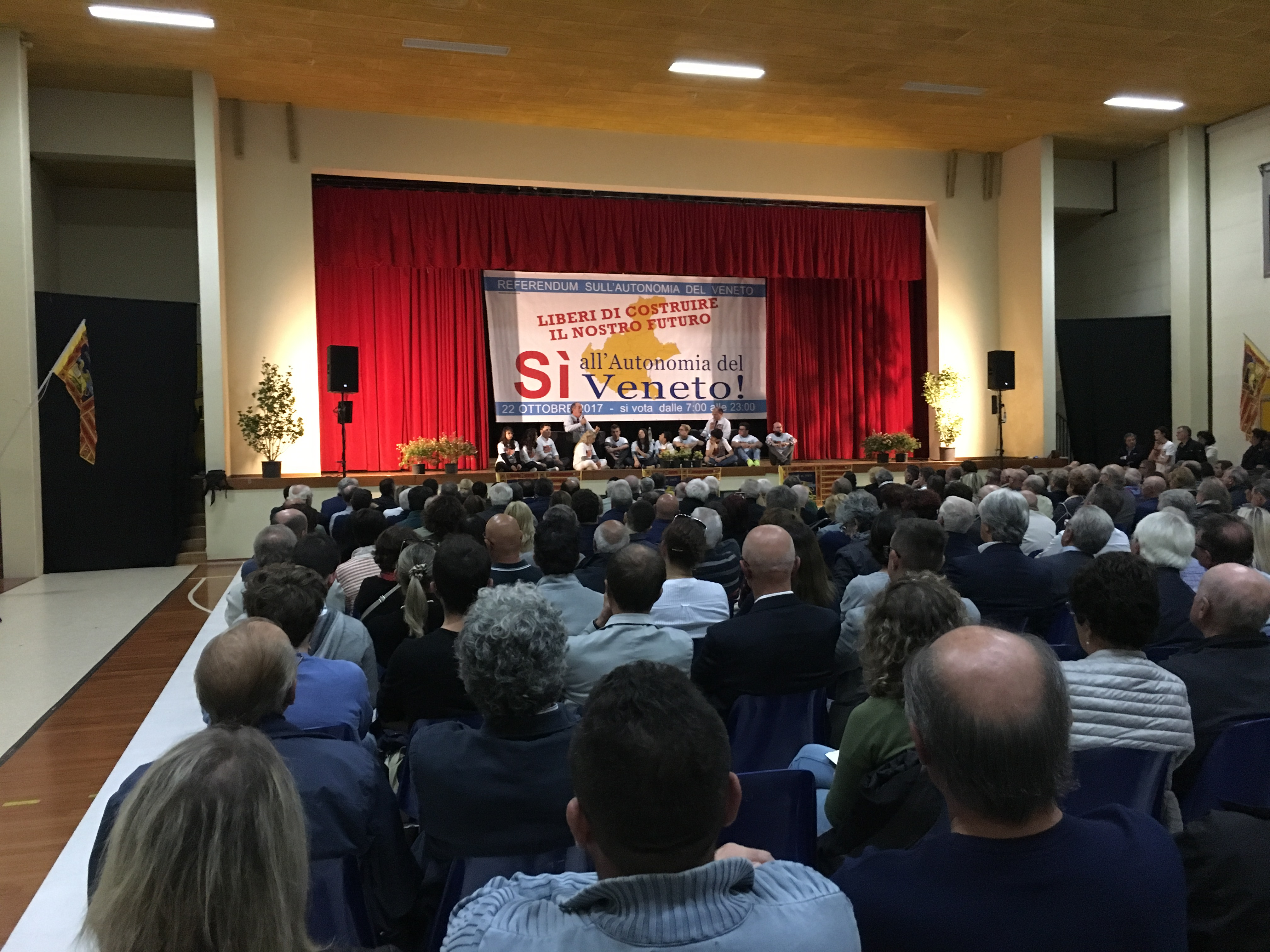 Alcune foto dall'evento "Le Ragioni del Sì" - 11 ottobre 2017, ore 18.00, Palazzetto Polivalente di Albignasego